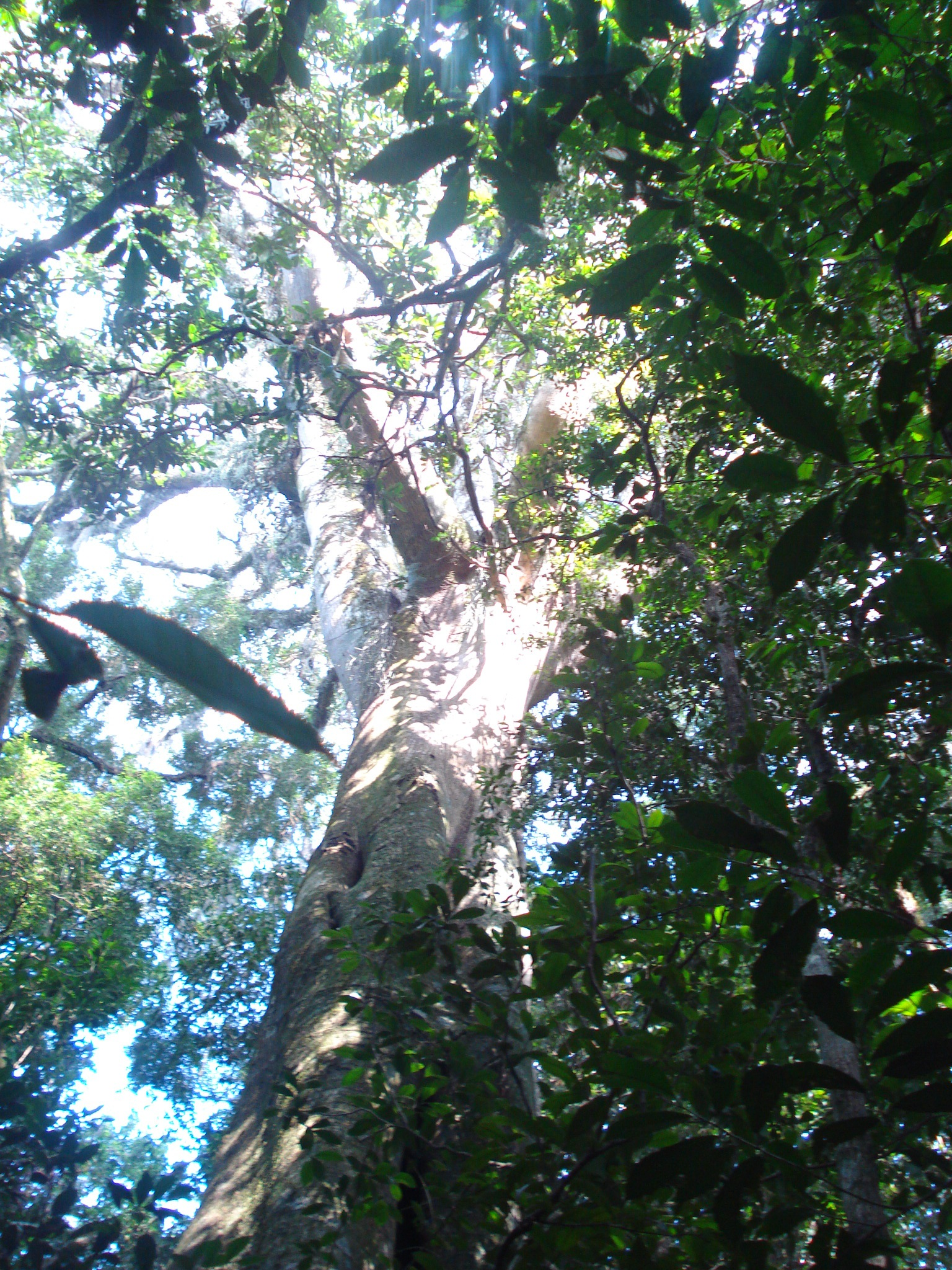 Figueira (Ficus cestrifolia) gigante (circunferência de 16,8 m e altura de 22 m) no Morro da Linh Ernesto Alves, Imigrante/RS.